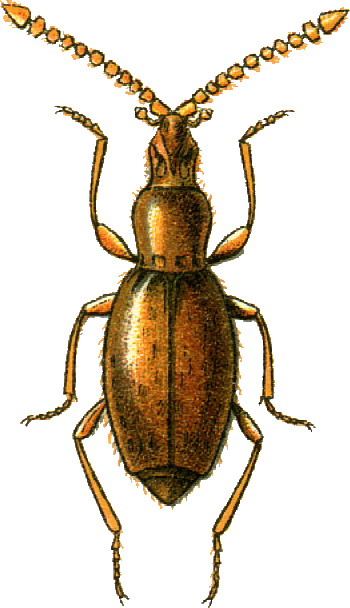 This file has been extracted from another file: Jacobs12.jpg